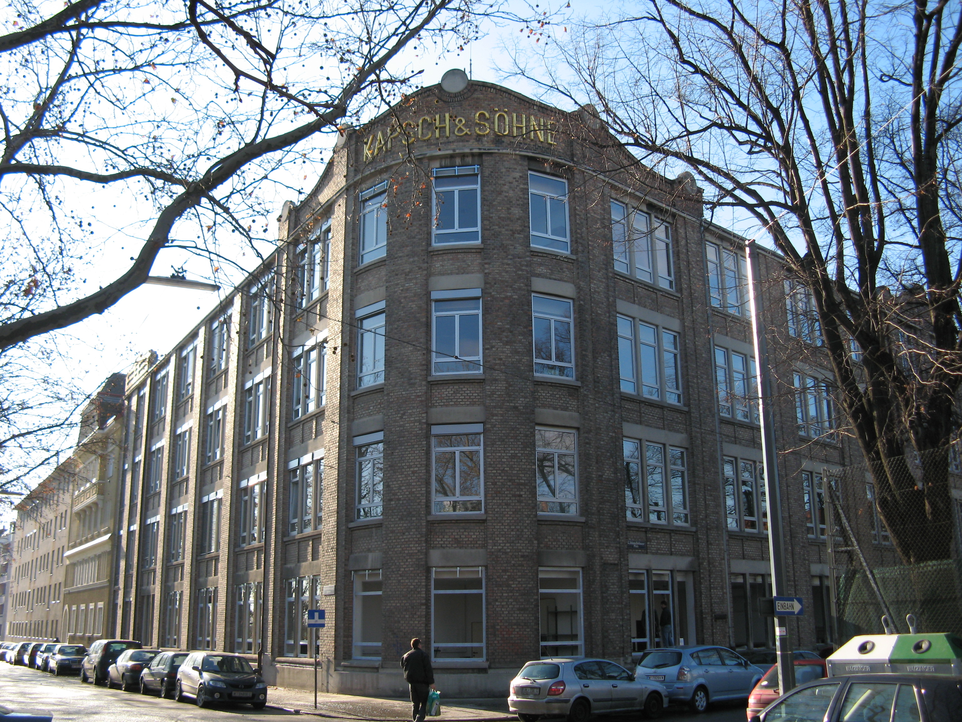 Fa. Kapsch AG (1912) von Ernst Epstein in Wien-Meidling